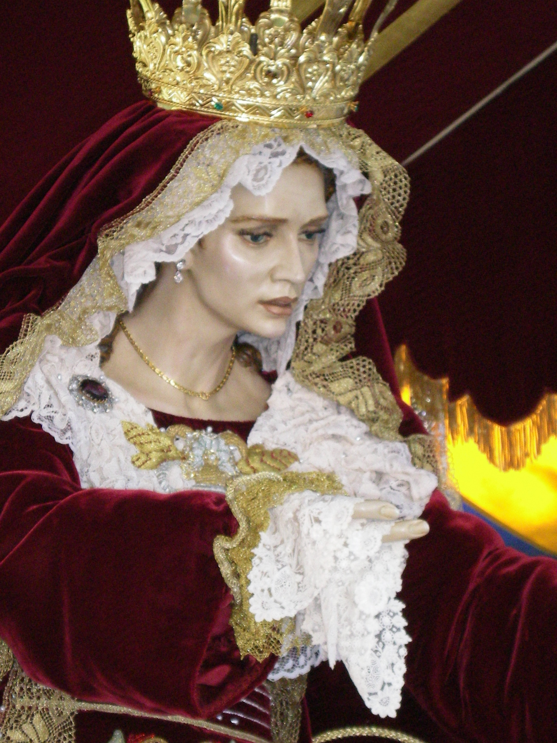 Virgen del Gran Poder